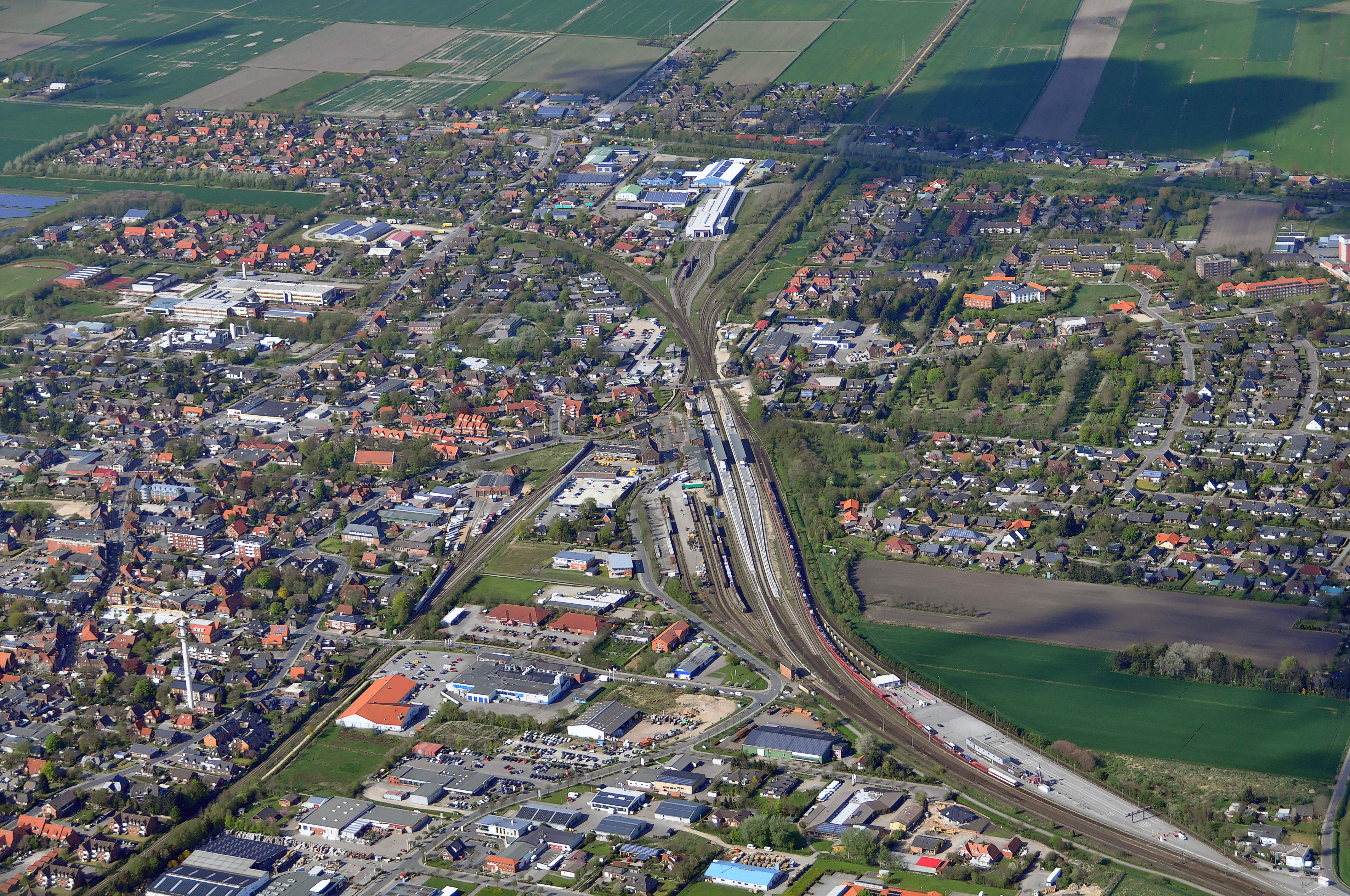 Luftbilder von der Nordseeküste 2012-05